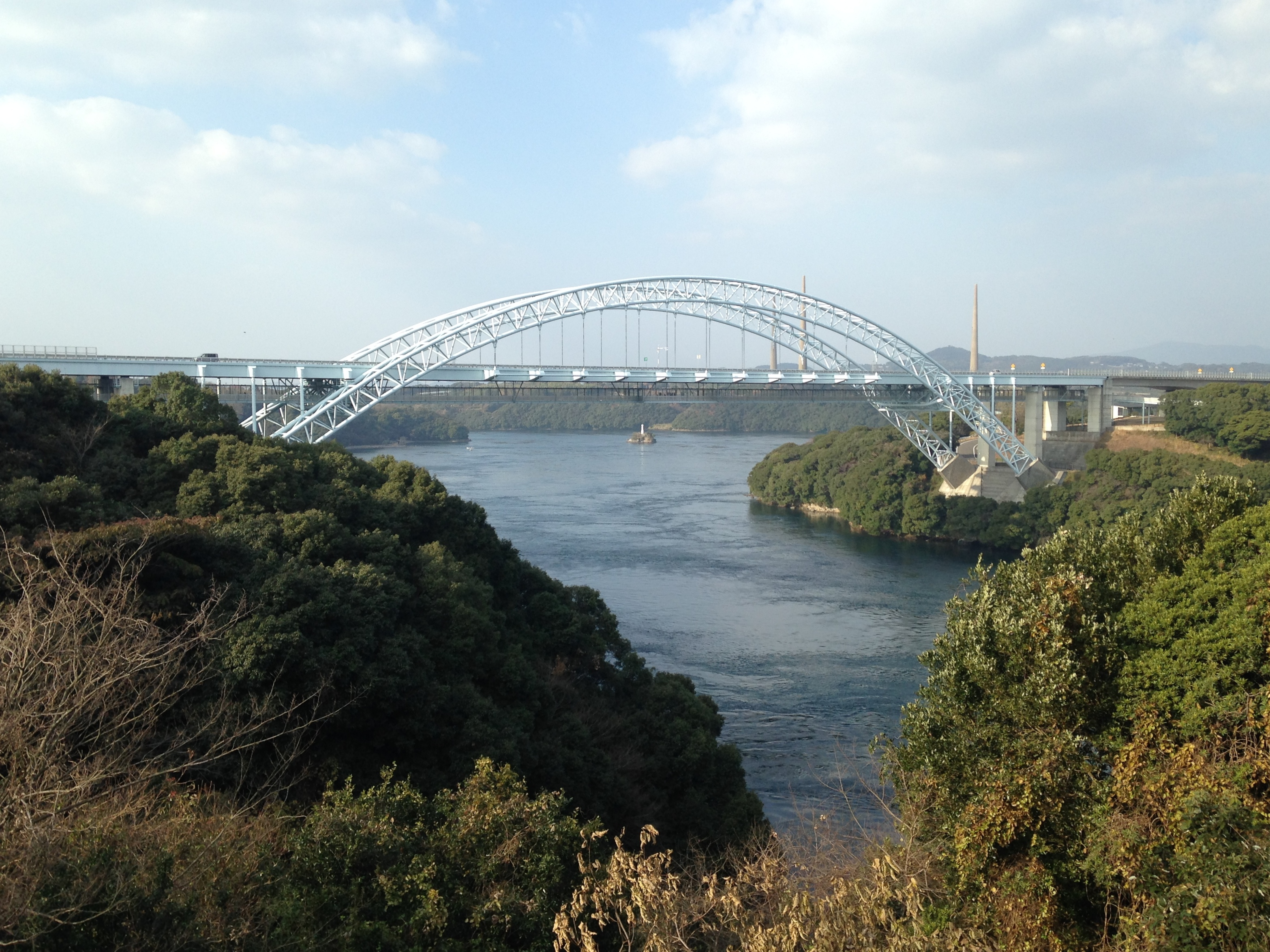 西海市側のウォークデッキより望む新西海橋